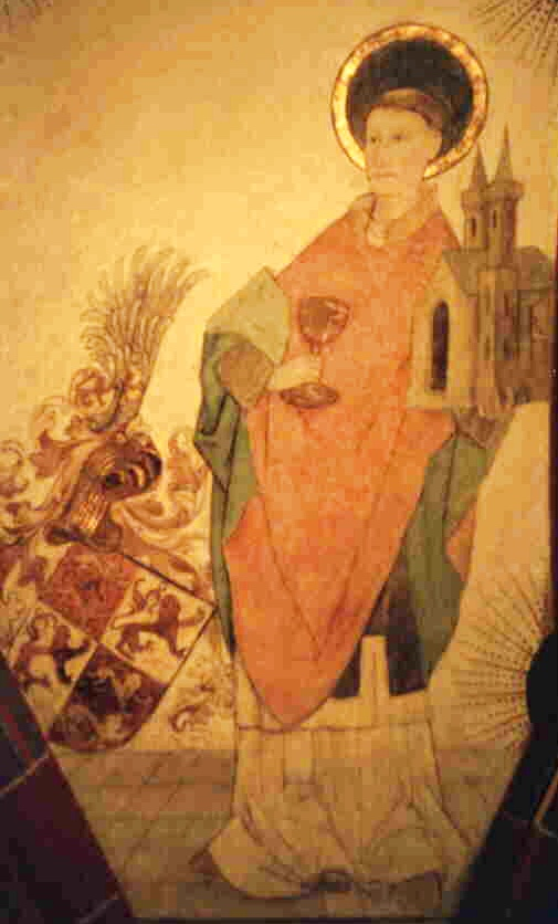 St. Goar, Fresko mit Stifterwappen in der Stiftskirche zu St. Goar, um 1450